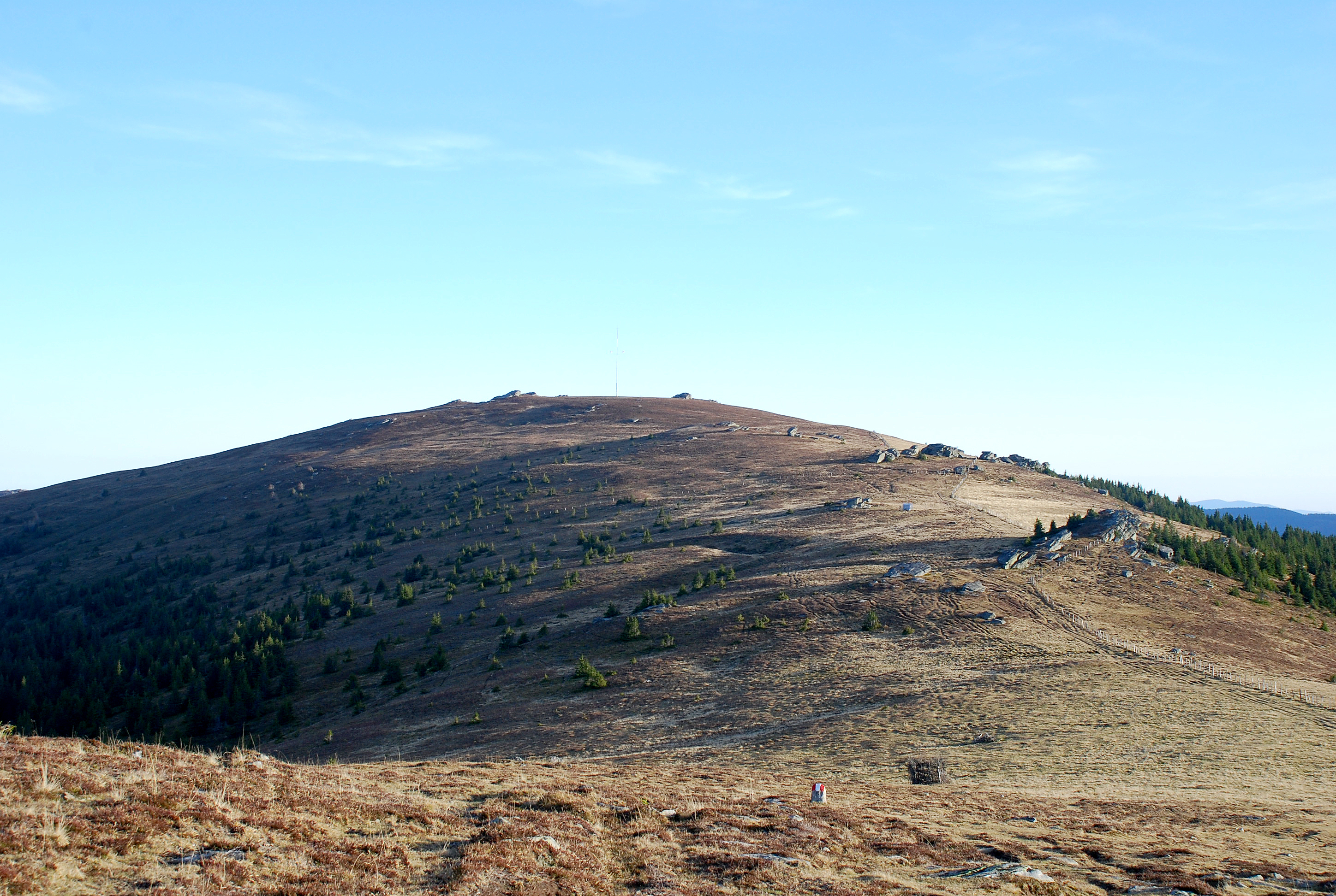 Handalm, Koralpe, Österreich: Berg und umgebende Landschaft (Almgebiet) in der mittleren Koralpe, ab 2014 Standort des Windparks Handalm